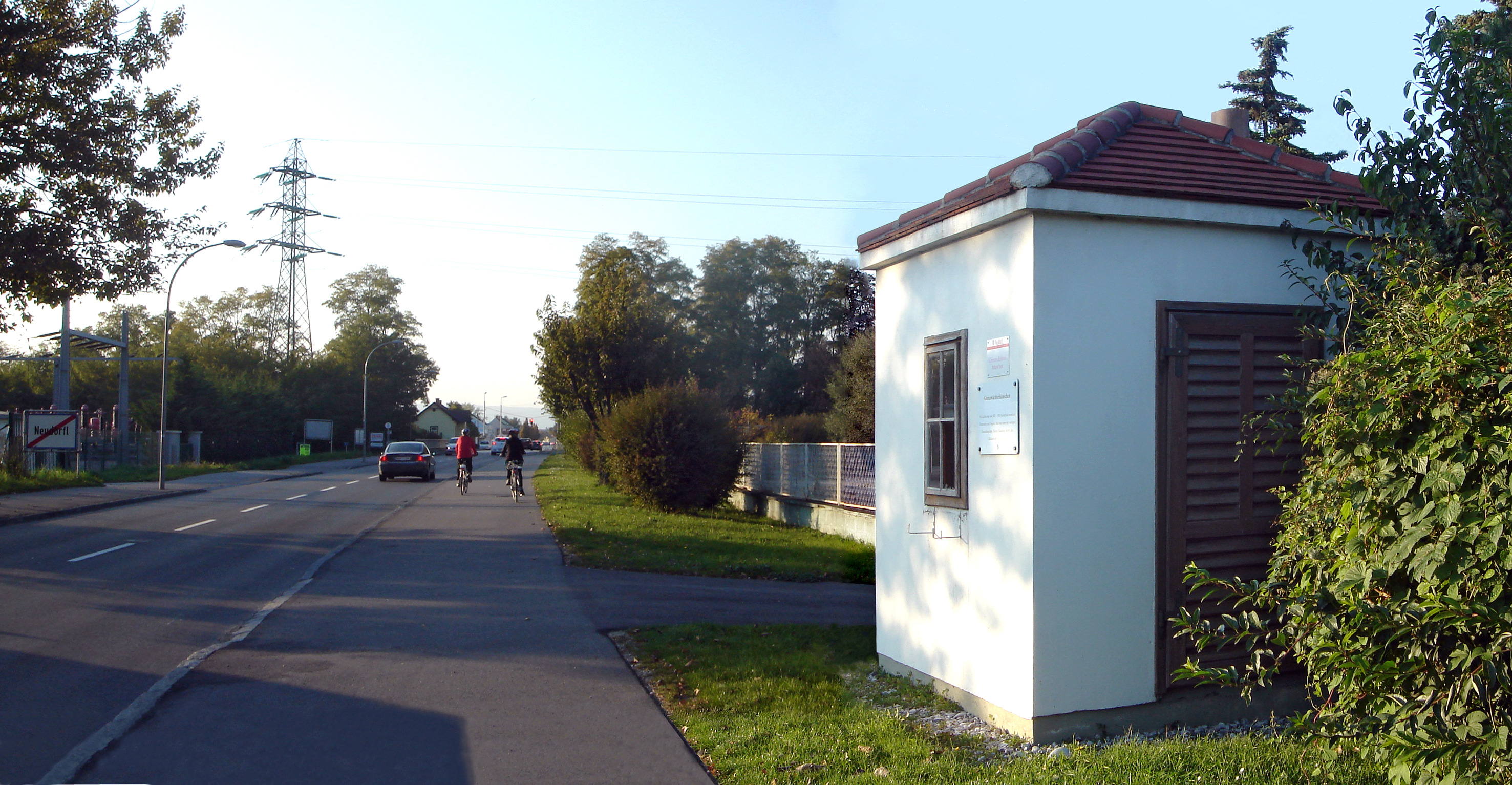 Neudörfl, Grenzwächterhäuschen am ehemaligen Übergang von Ungarn nach Österreich